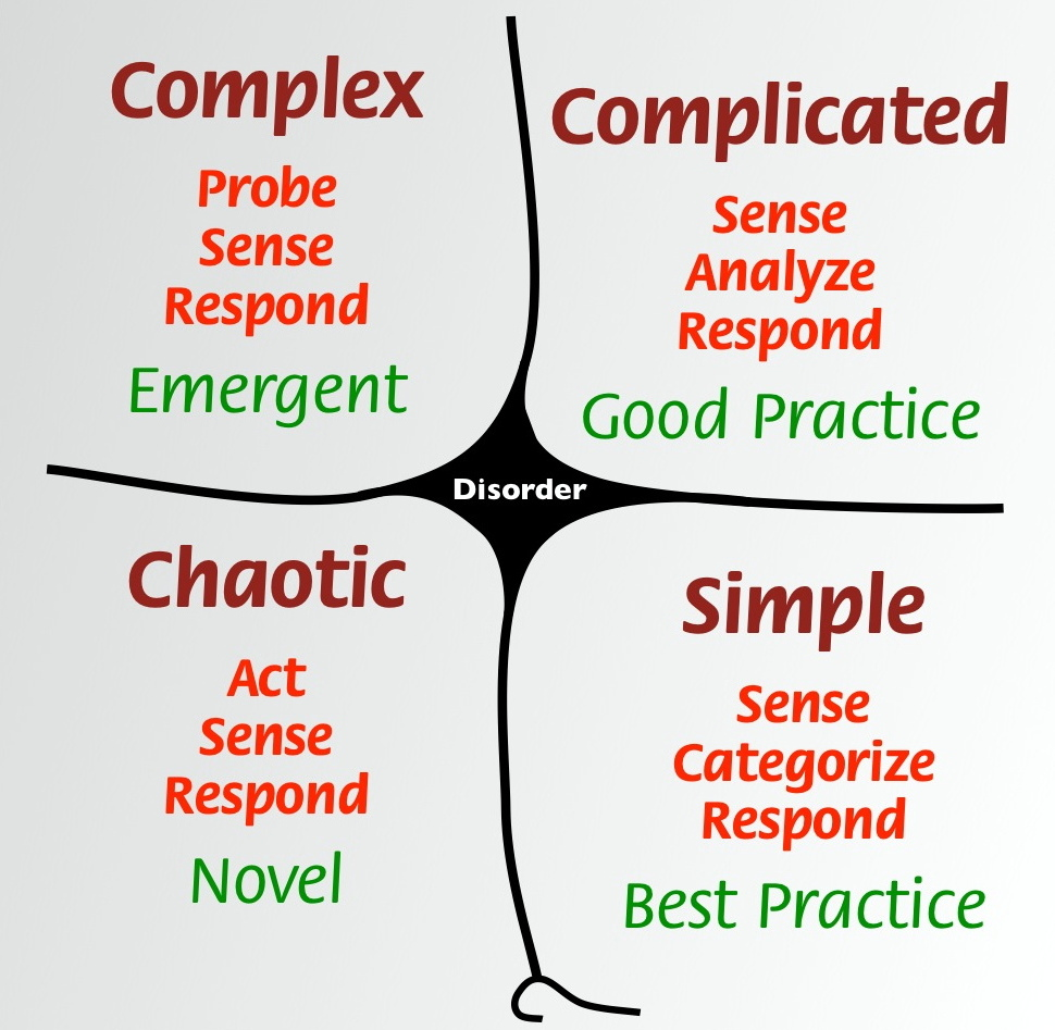 Cynefin framework